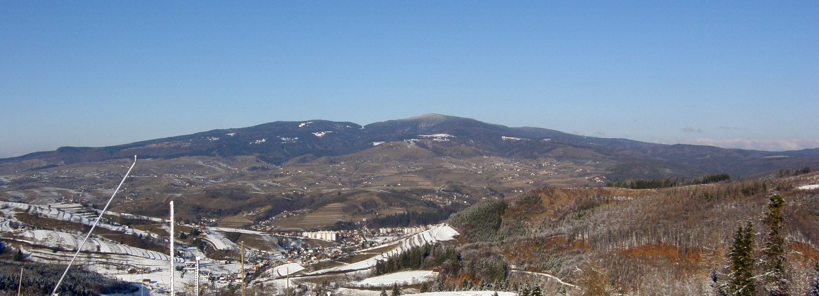 Hriňová - Košutka 2008